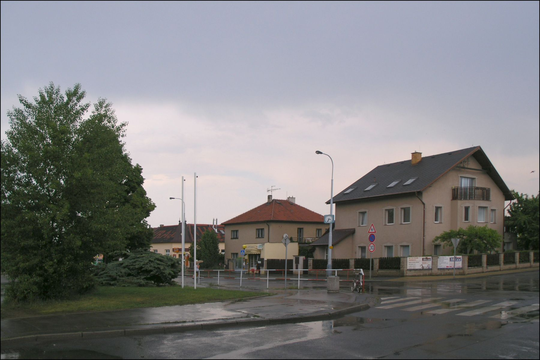 Suchdolská ulice (od křížení se Staročeskou), Praha Suchdol